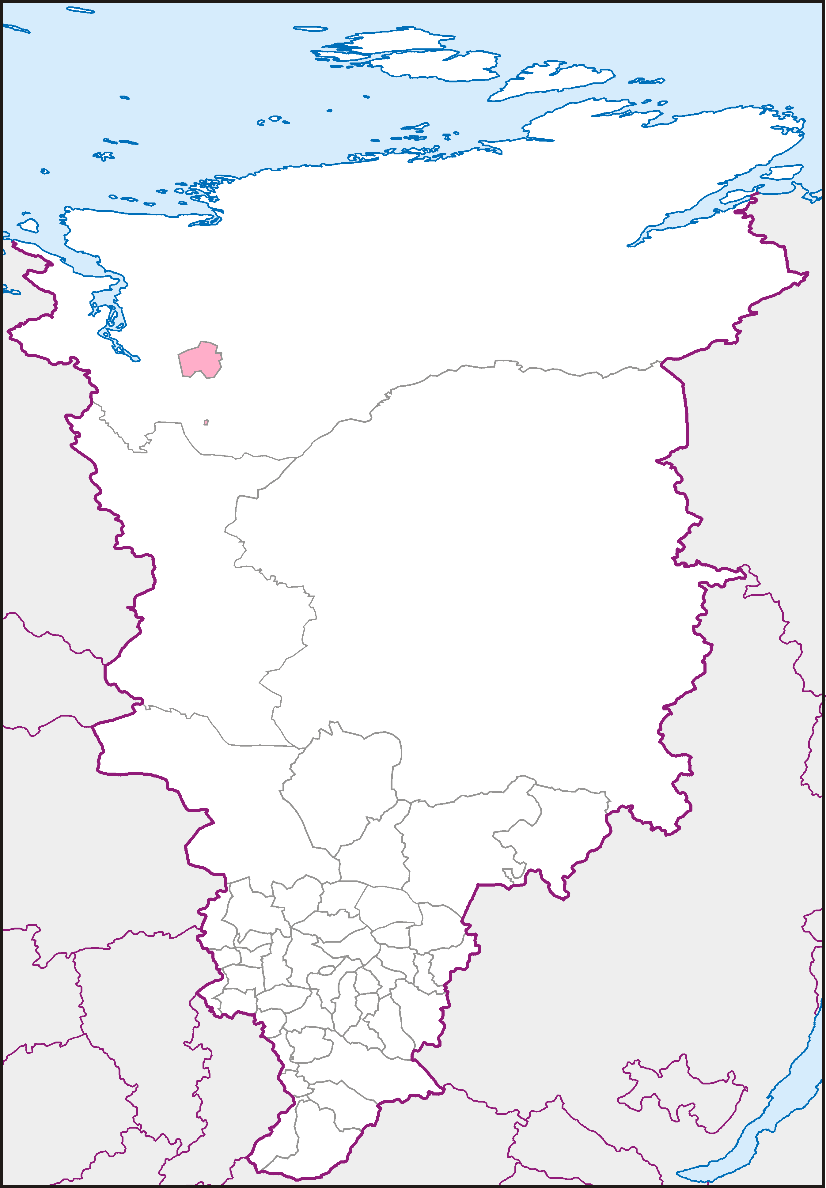 Норильск (краевой город и городской округ) на административной карте Красноярского края